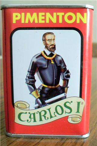 Ladskatolo de papriko, uzanta la bildon de la Imperiestro Karlo la 5-a, produktita en lia mortovilaĝo Cuacos de Yuste